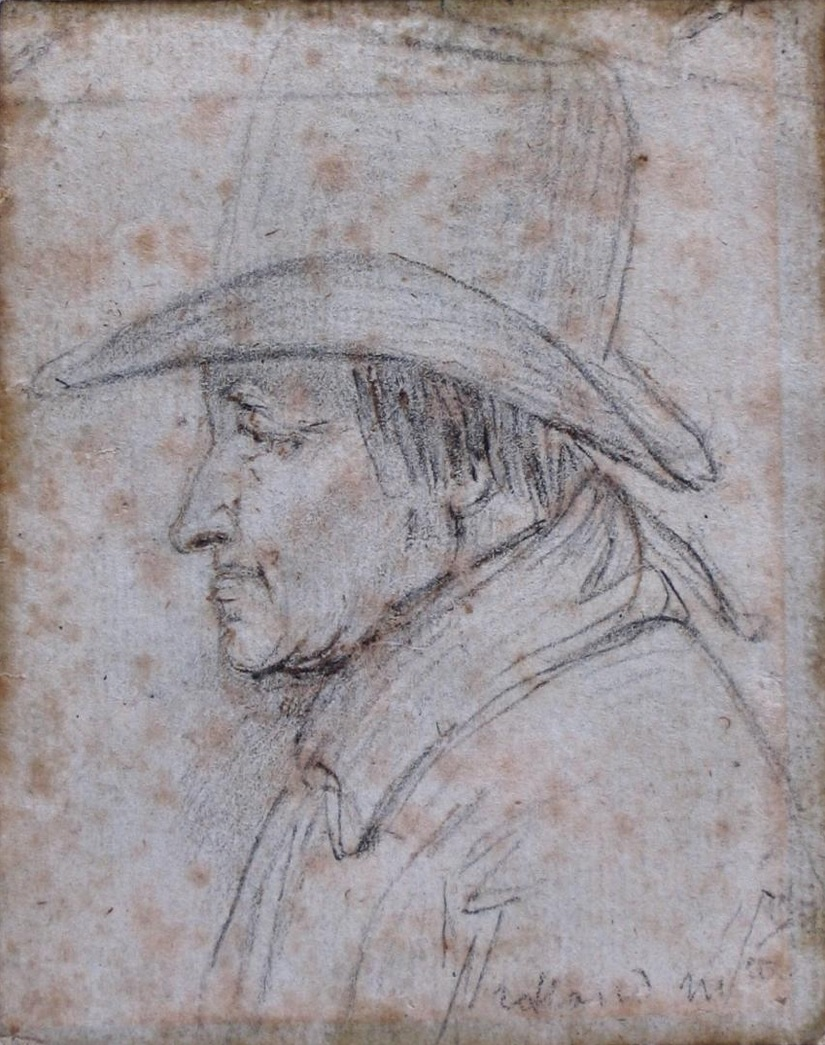 Roland de la Platière, portrait en buste de profil gauche, musée Carnavalet, vers 1792-1793.